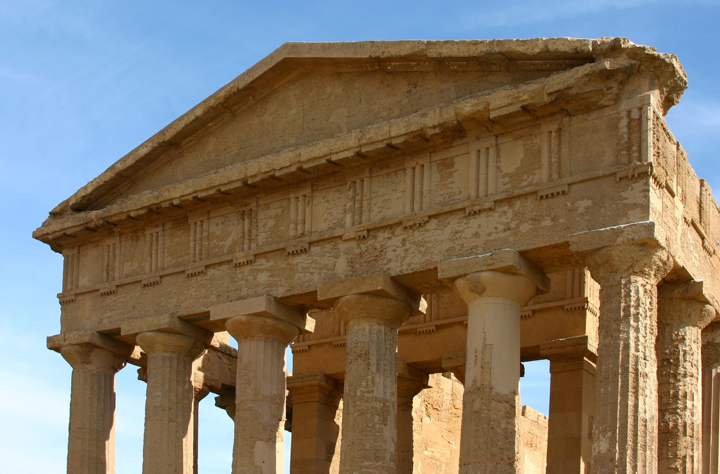 emple of Concordia